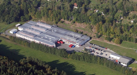 Tubex neu